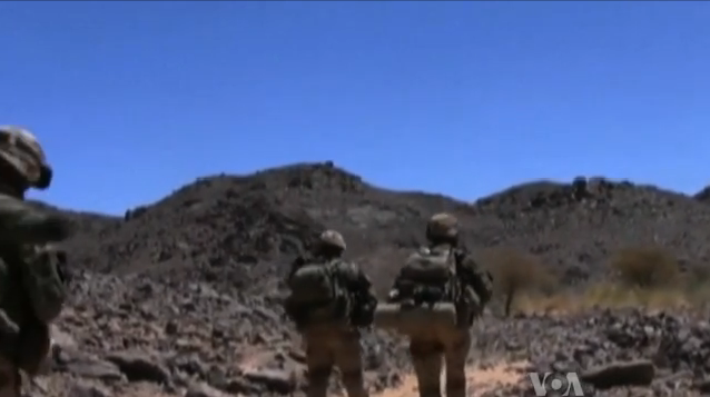 Soldats français pendant la bataille de Tigharghâr au Mali, février-mars 2013.